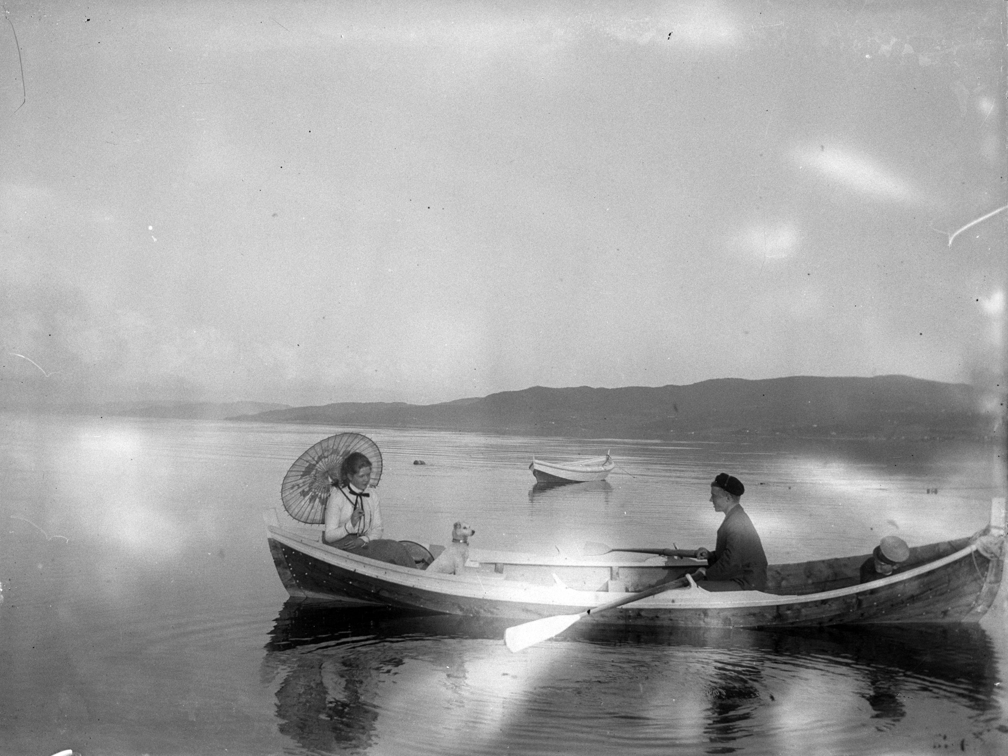 Format: Glassnegativ Dato / Date: Ukjent, ca. 1900. Fotograf / Photographer: Ukjent Sted / Place: Trondheim? Oslo? Wikipedia: Andreas Moe (1883 - 1957) Wikipedia: Færing Digitalarkivet: Andreas Moes husstand i St. Olavs gate 22 i Kristiania (Folketellingen 1900) Eier / Owner Institution: Trondheim byarkiv, The Municipal Archives of Trondheim Arkivreferanse / Archive reference: Tor.H42.B62.F4299 Merknad: Bildet viser tidligere ordfører i Trondheim Andreas Moe (1883 - 1957) til rors med en mulig sommerflørt ca. 1900 (eller kanskje sammen med sin søster og bror?). Ved Folketellingen i 1900 opplyses det at han gikk Handelsgymnaset i Christiania. Den hvite hunden går ofte igjen på flere av bildene etter Andreas Moe.